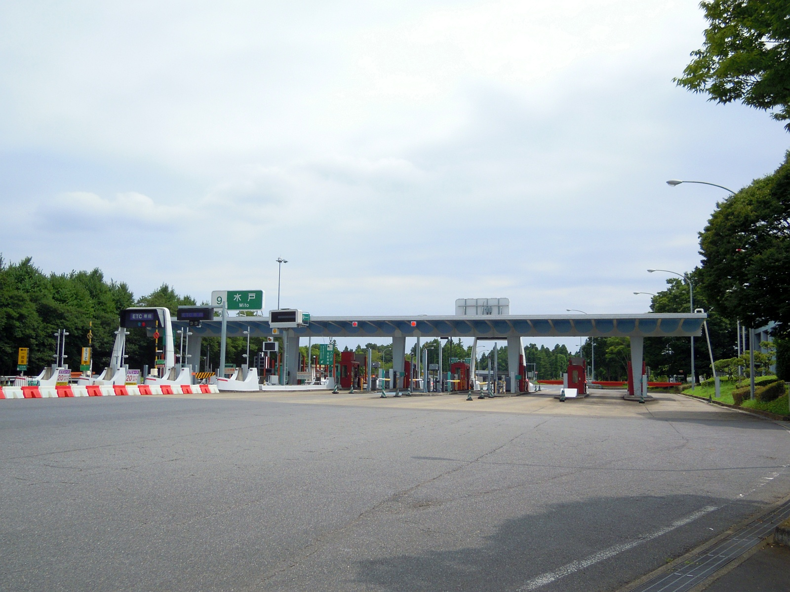 茨城県水戸市にある常磐自動車道の水戸インターチェンジ料金所を一般道側から。